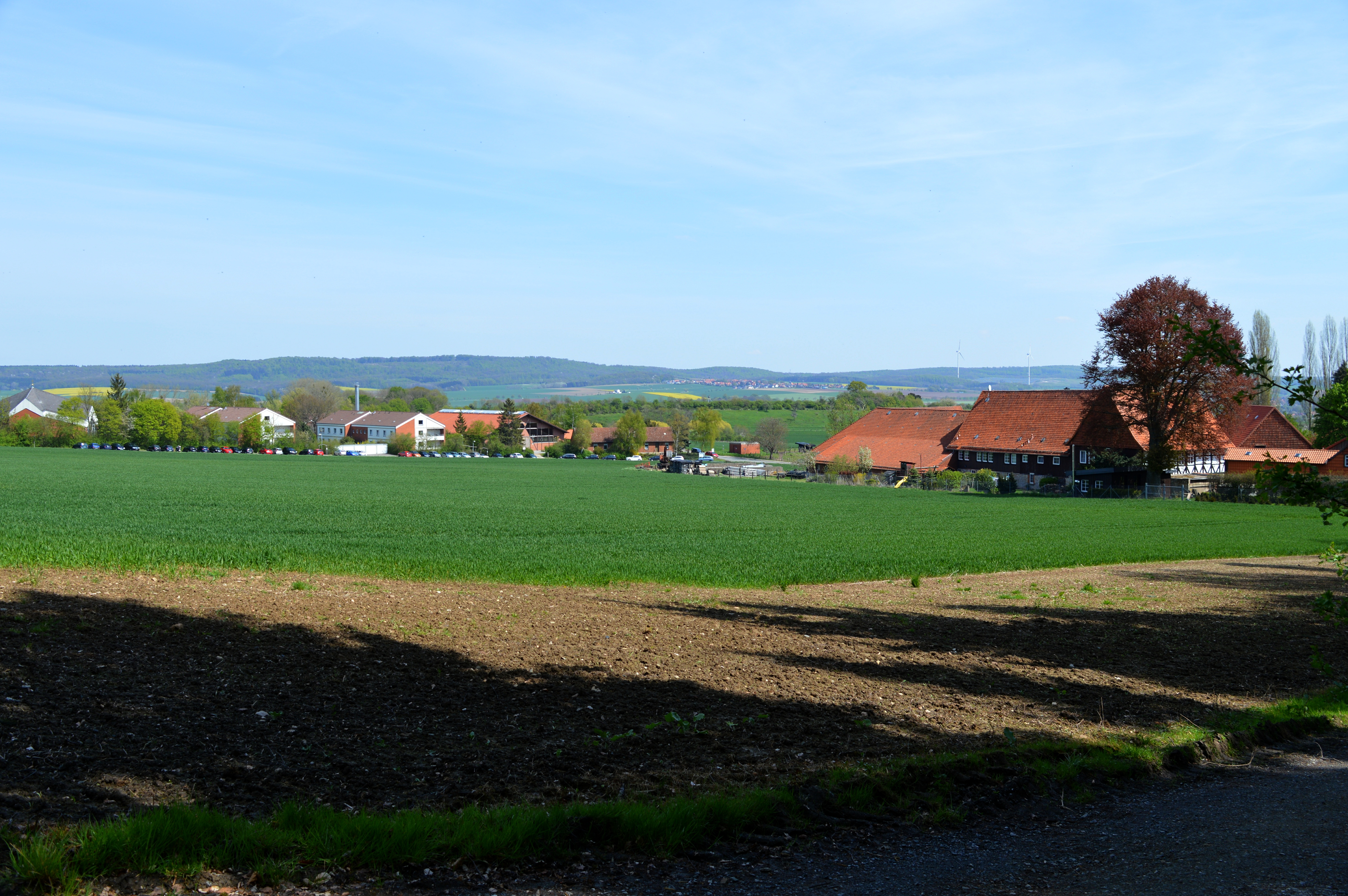 Landschaftsschutzgebiet Röderhofer Teiche und Egenstedter Forst (LSG HI 0028)